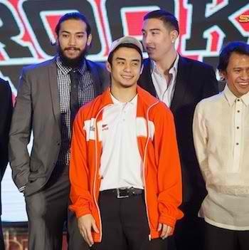 Draft night